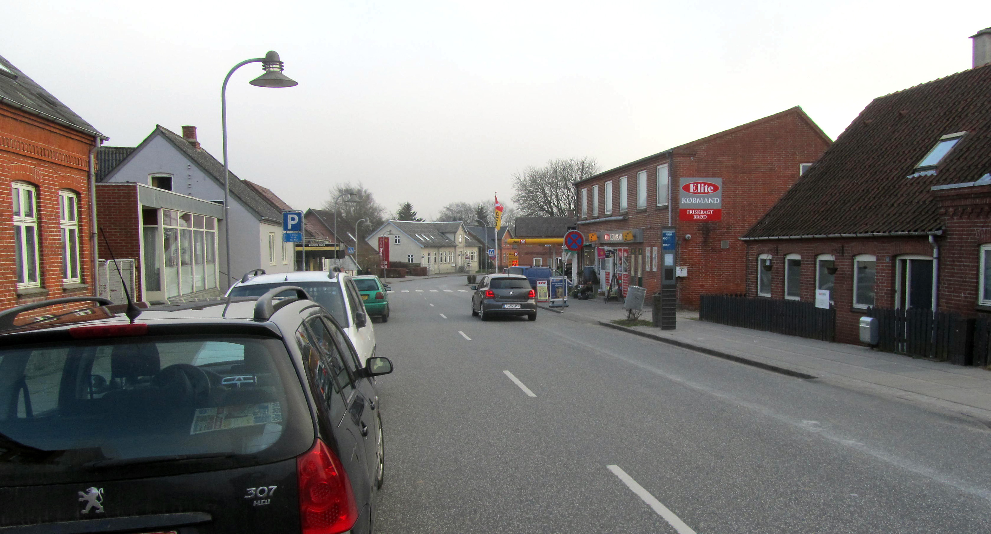 Malling syd for Aarhus; Hovedgaden set mod syd